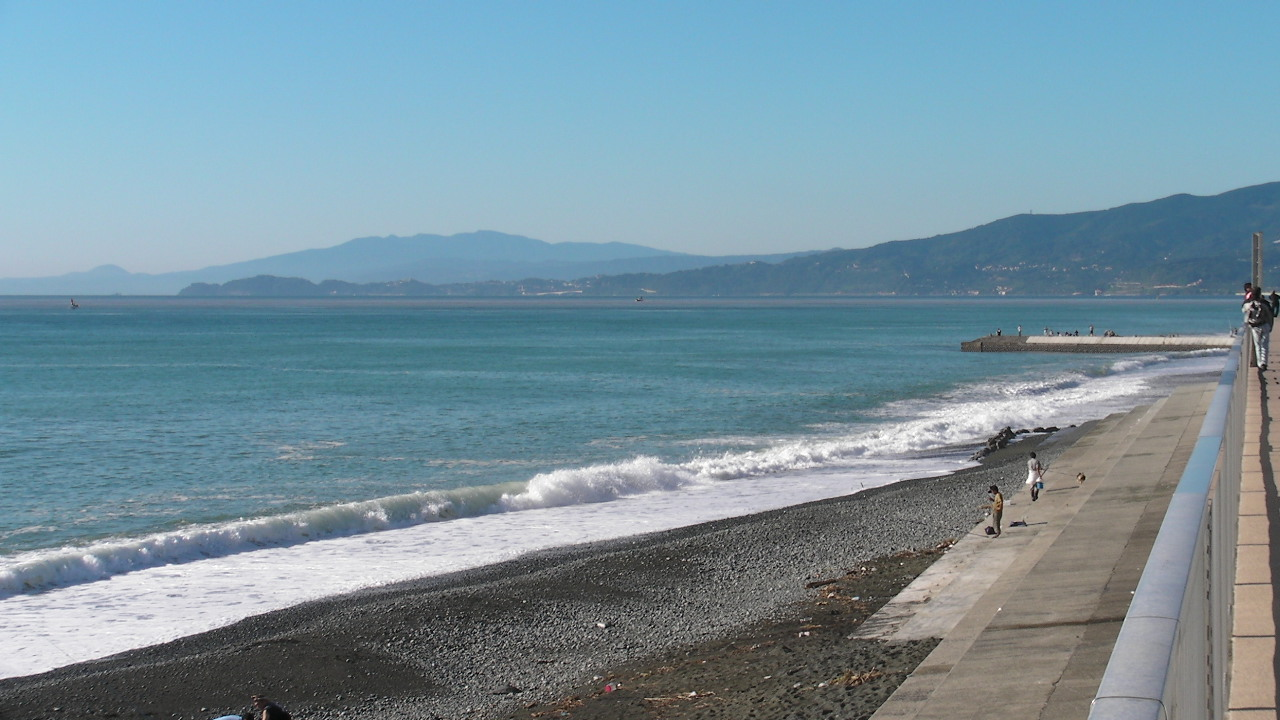 海沿いにあるため気持ちが良い